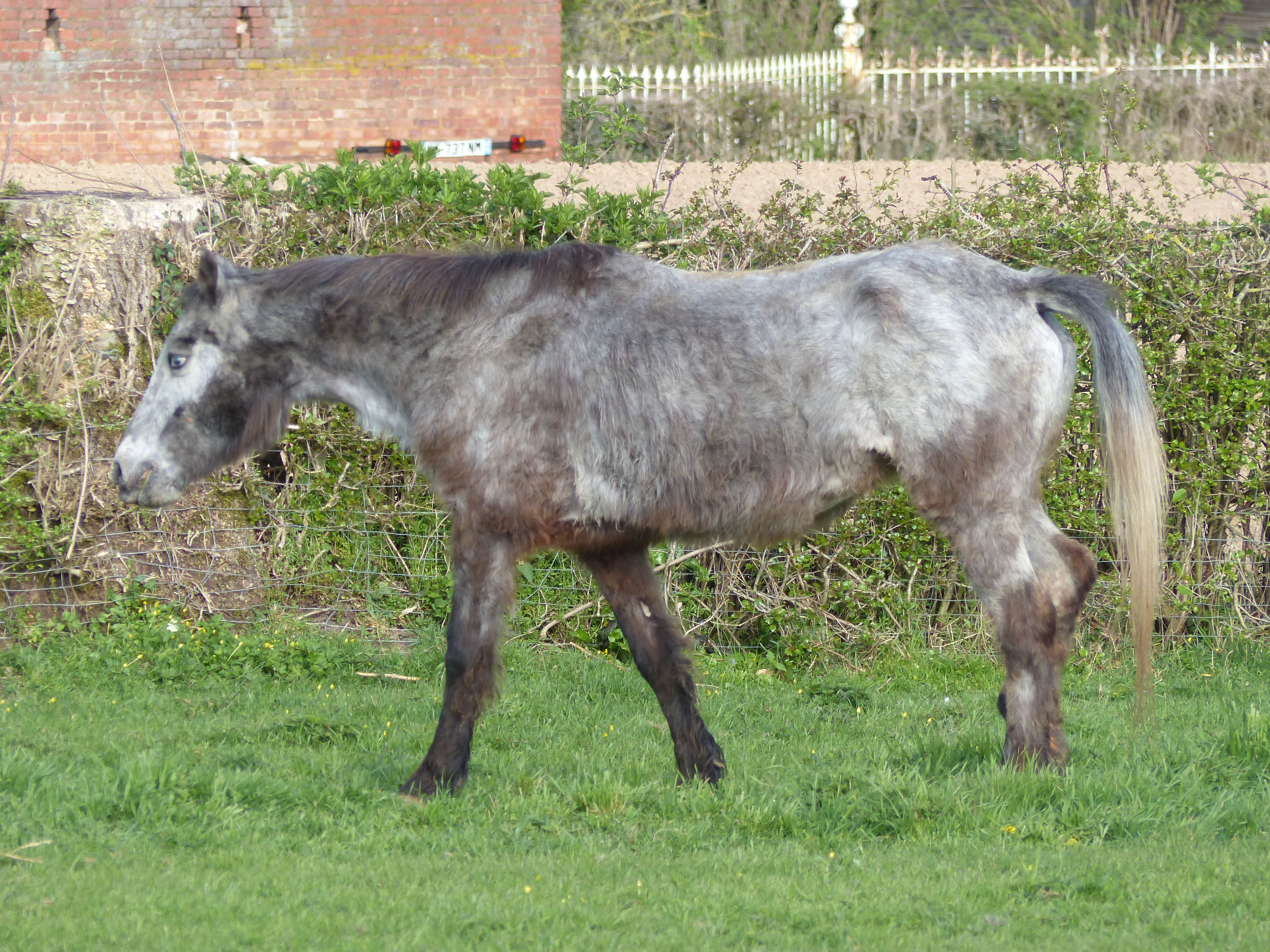 Jeune cheval gris maigre (côtes et pointes de hanches bien visible) au printemps, en Normandie. Dénutri et avec probable dermatose (voir queue).